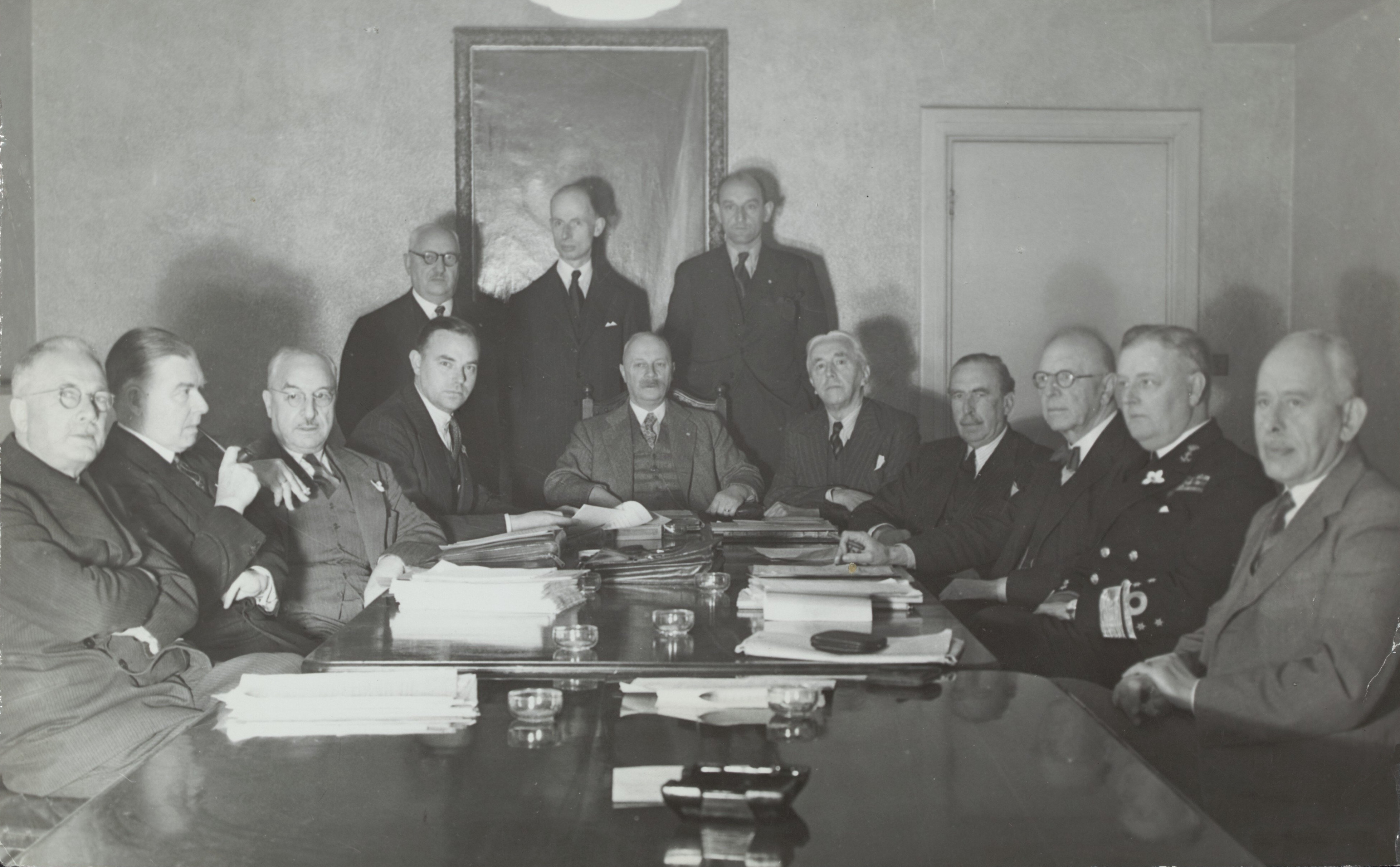 Kabinet Gerbrandy II, London, 2e helft 1944. Van links naar rechts (staand):van Lidth de Jeude, van Kleffens, van Heuven Goedhart, (zittend): van den Tempel, de Booy, van den Broek, Burger, Gerbrandy, Bolkestein, Michiels van Verduynen, Albarda, Furstner, van Boeyen.